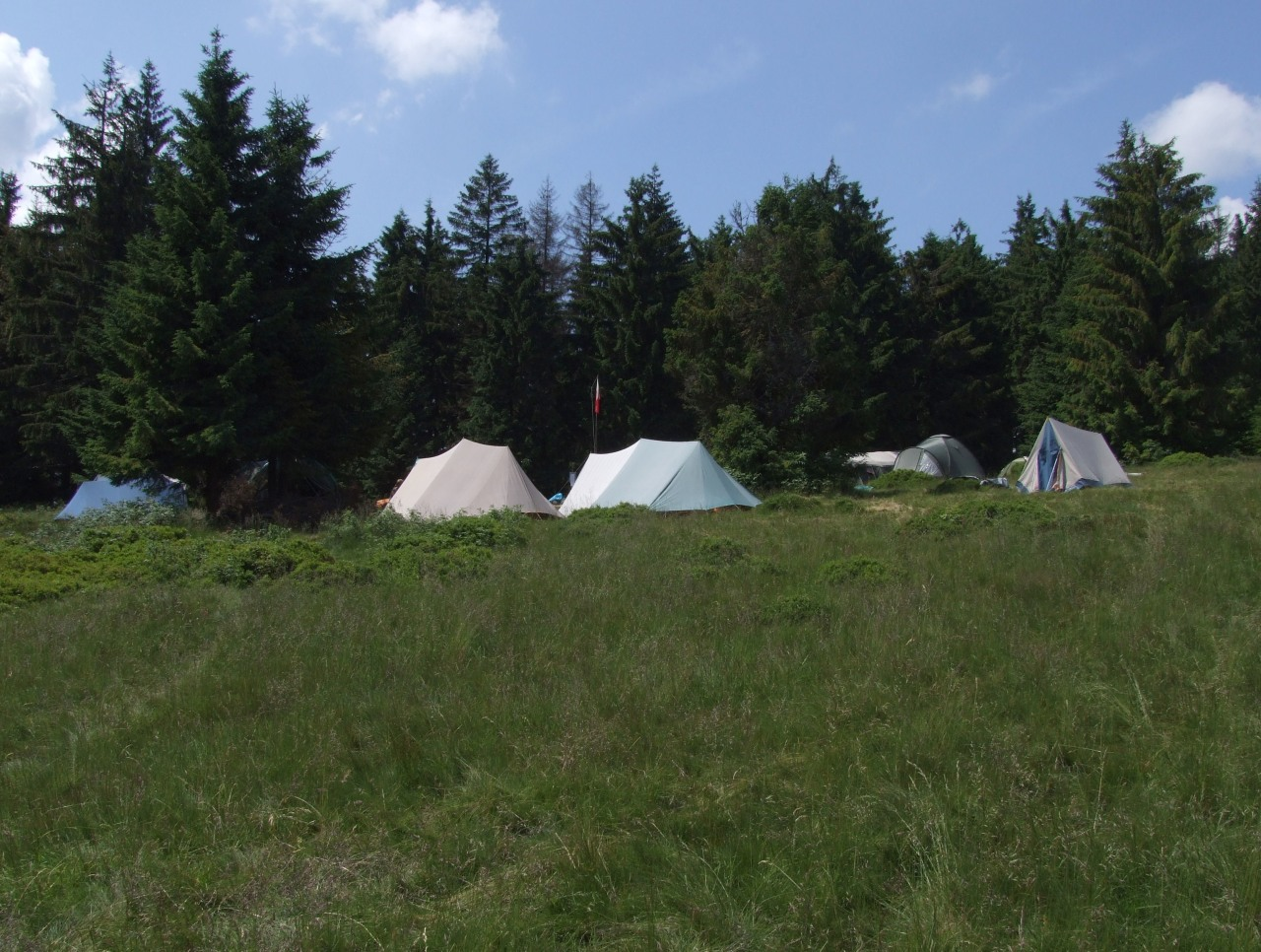 Baza namiotowa pod Gorcem